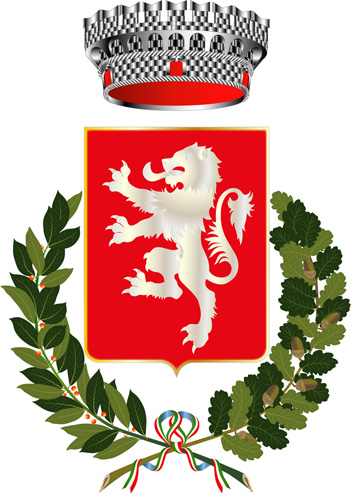 Das Wappen der italienischen Gemeinde Castiglione a Casauria